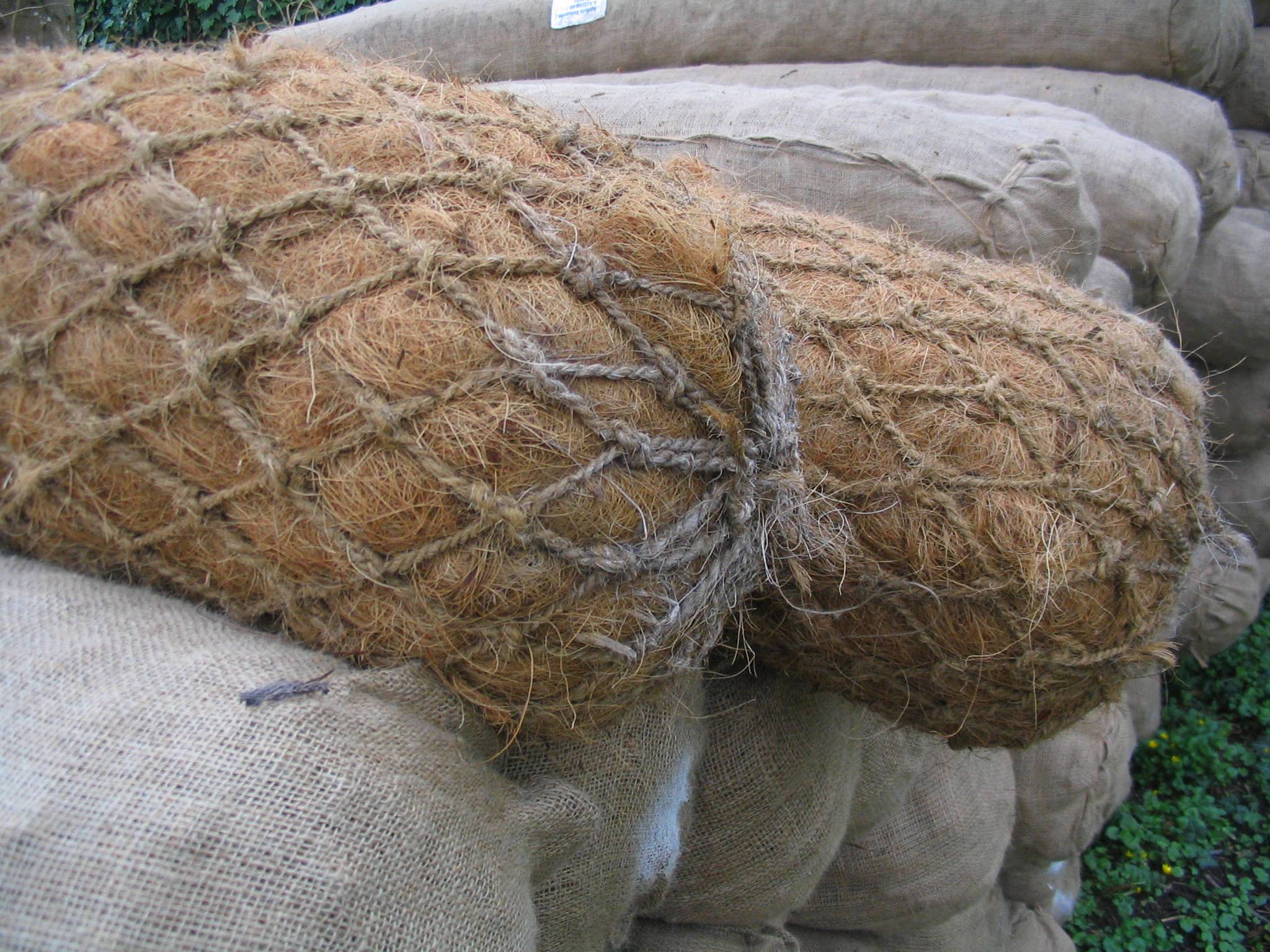 Stockage des boudins de renforcement des berges en fibre de coco au Parc Jean-Jacques-Rousseau, Ermenonville, France.